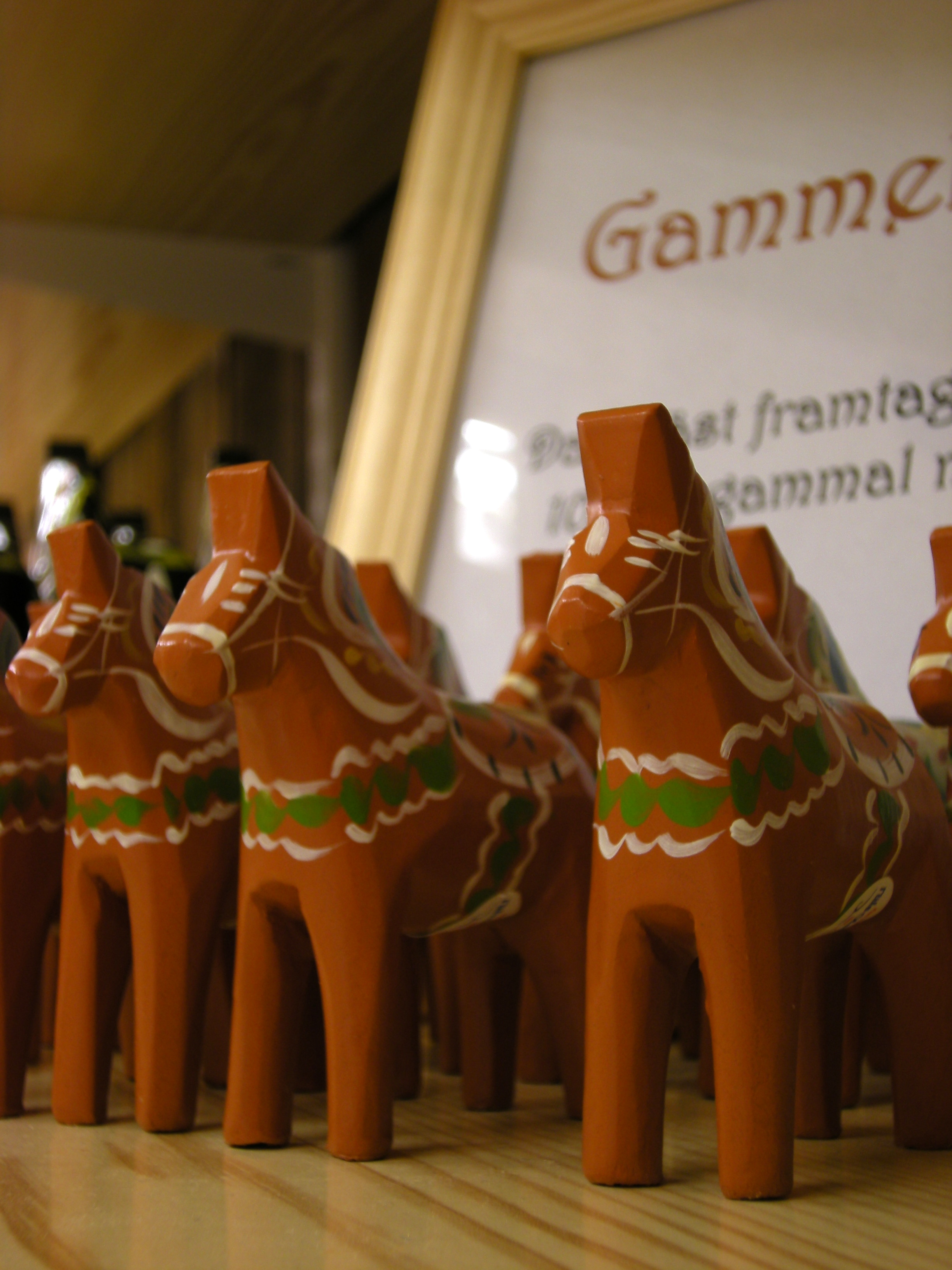 Nusnäs Dalahästtillverkning